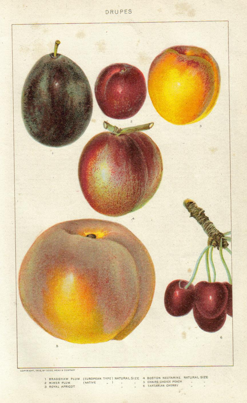 Painting